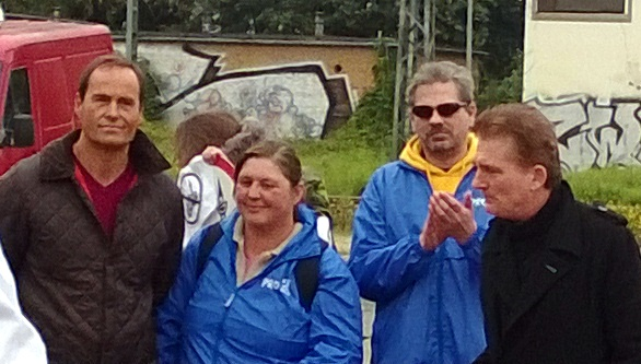 pro-NRW-Demo in Mönchengladbach Rheydt, Mittelstraße, schräg gegenüber der Ar-rahman-Moschee, am 12. 10. 2013, mit Jörg Uckermann, Stellvertretender Vorsitzender pro NRW und Vorstandsmitglied pro Köln (li.) und Detlev Schwarz, Geschäftsführer pro NRW und Kreisvorsitzender pro Bonn (re.).